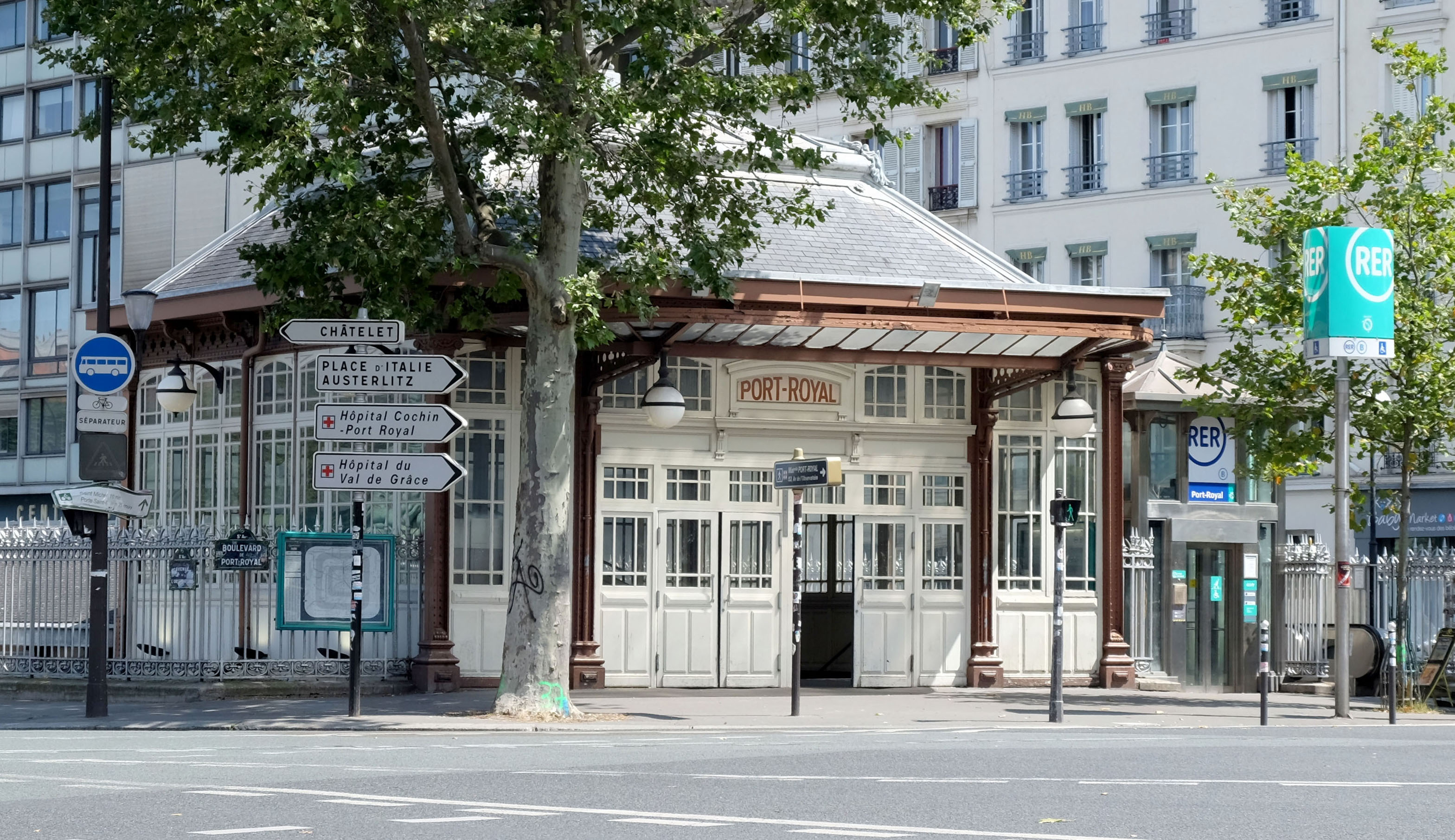 Gare de Port Royal du RER B à Paris, Juillet 2016.